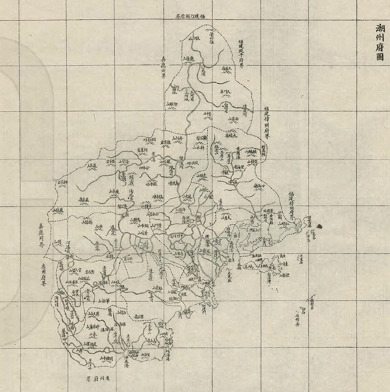 广东舆地全图 潮州府图 张人骏 光绪二十三年（1897）